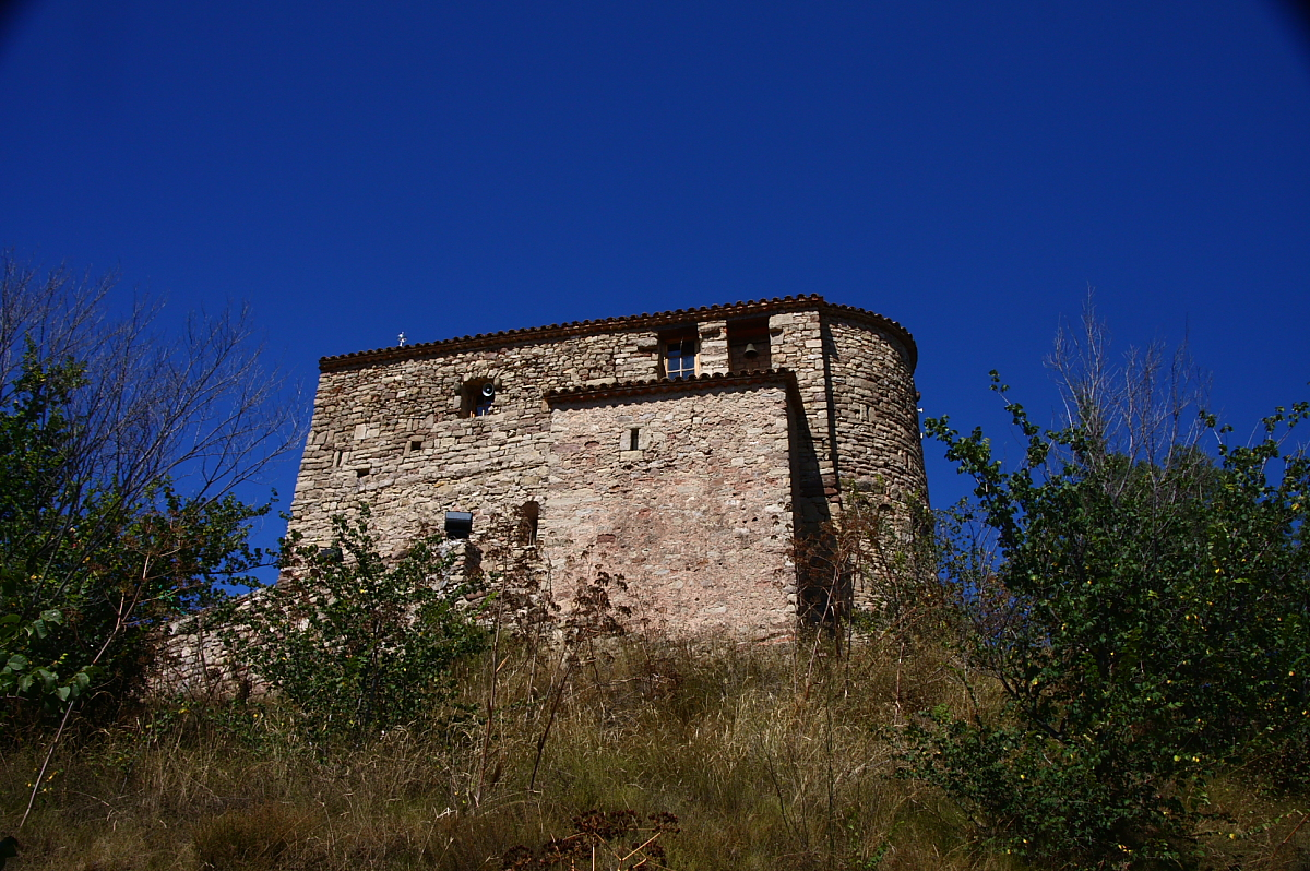 Gallifa, Ermita de la Mare de Déu de l'Ecologia, dins del castell de Gallifa (Vallès Occidental -Catalunya).